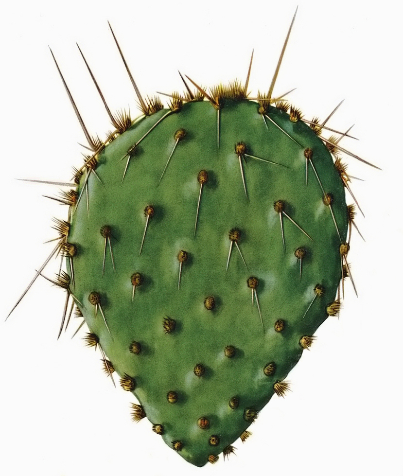 Opuntia macrorhiza